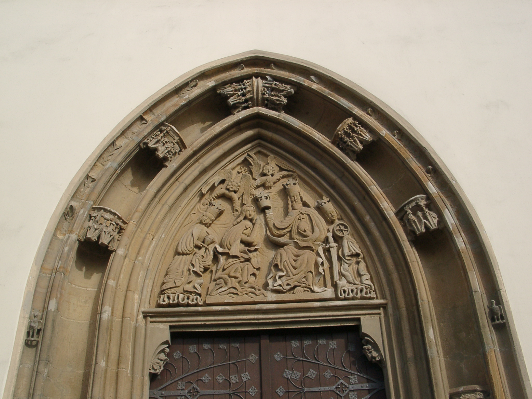 Volkach